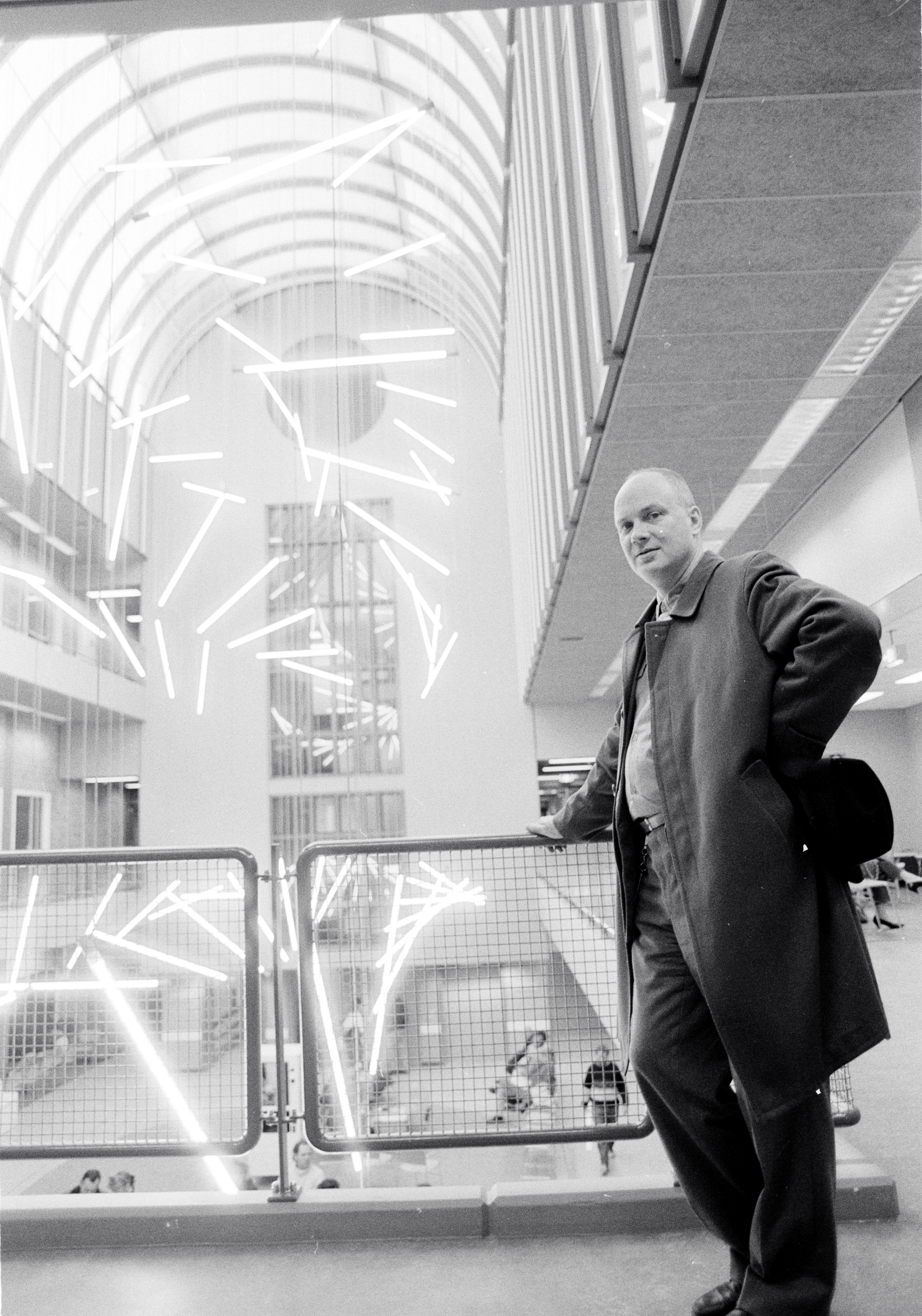 Portret van kunstenaar Peter Struycken, de ontwerper van de lichtsculptuur achter hem, dat hangt bovenin het atrium in het nieuwe polikliniekengebouw van het Diakonessenhuis (Bosboomstraat 1) te Utrecht.